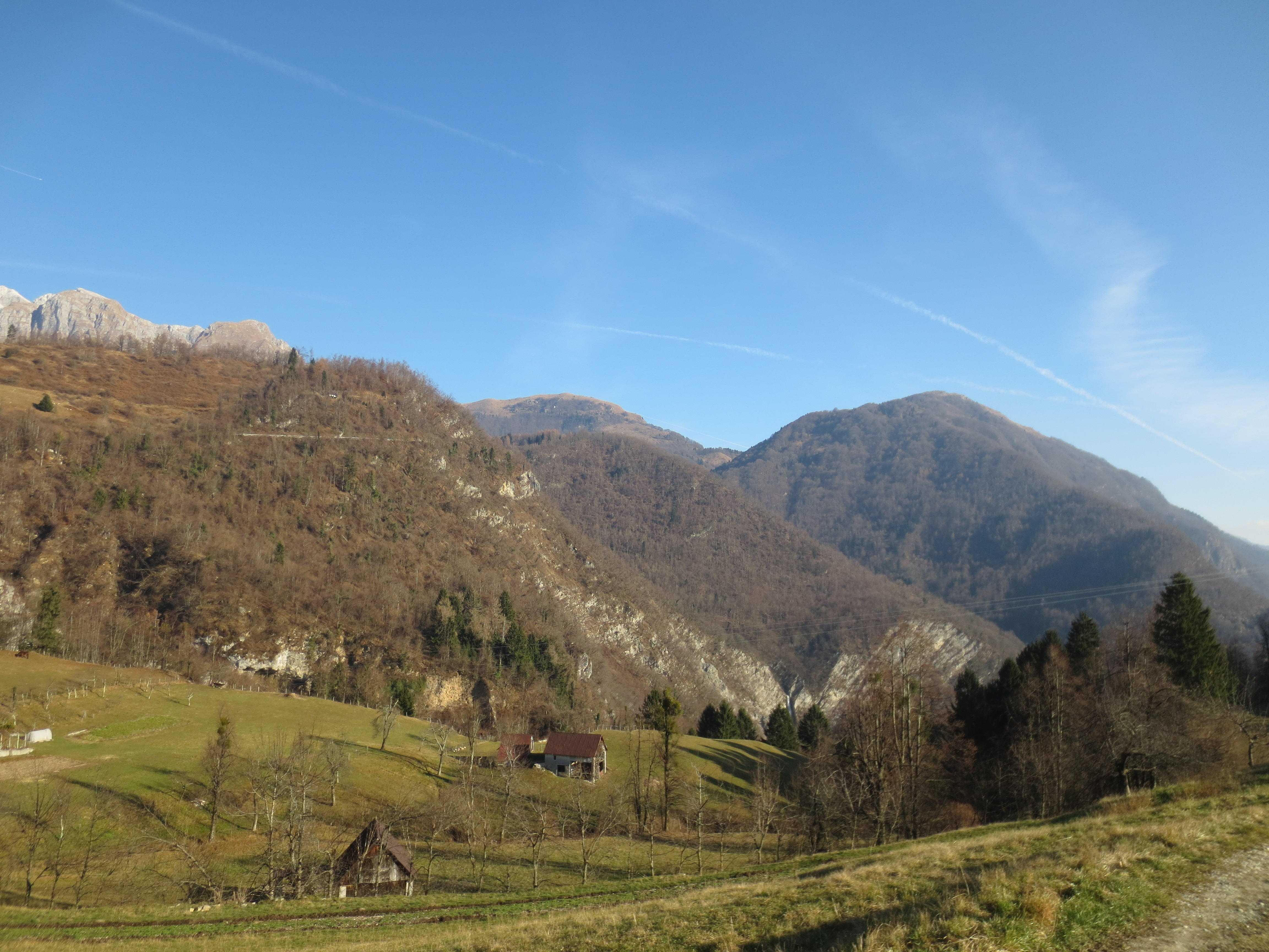 Pogled z razgledne točke Knik. V ozadju je viden Gregorčičev slap.